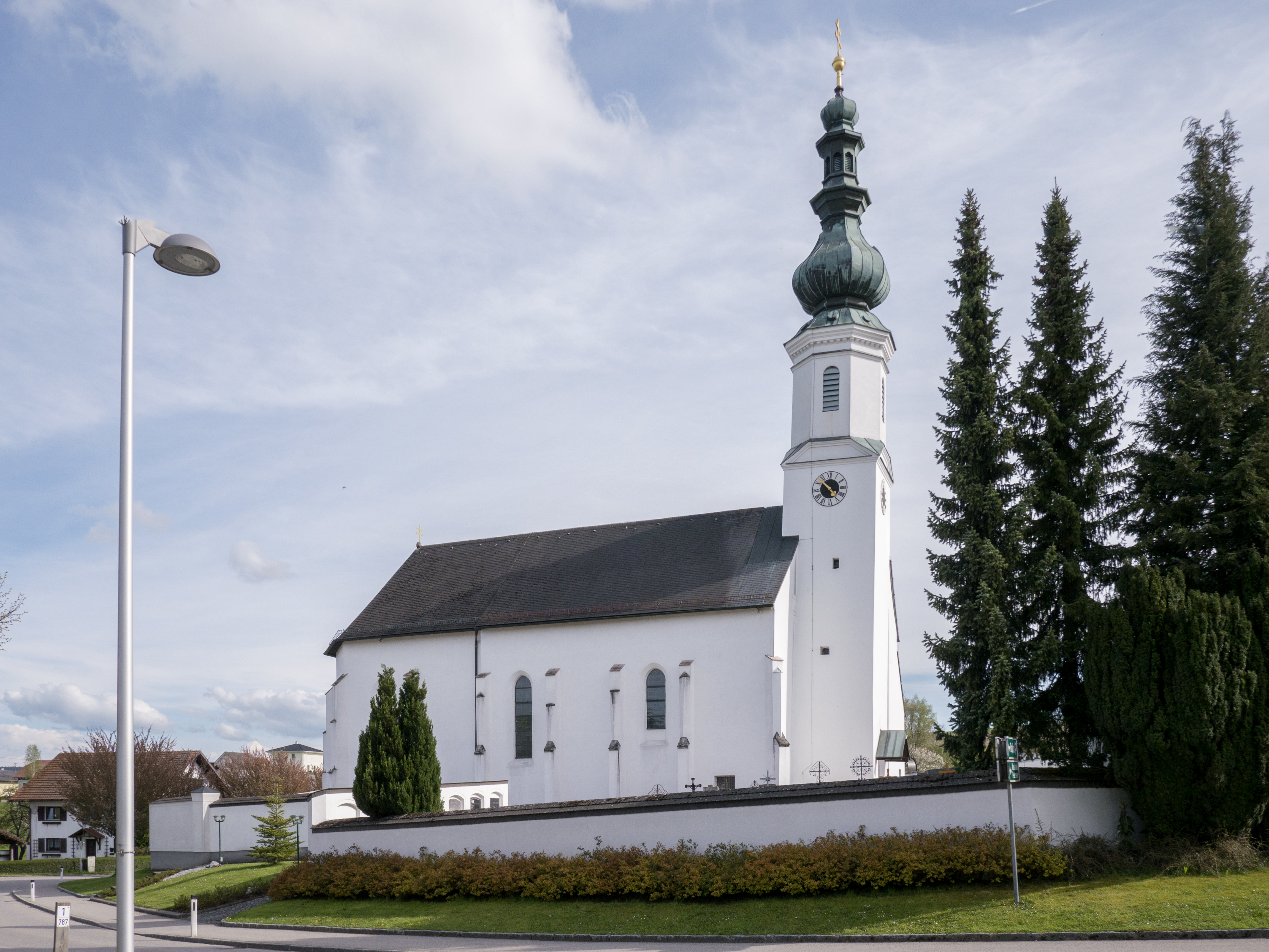 Kath. Pfarrkirche hl. Martin und Friedhof